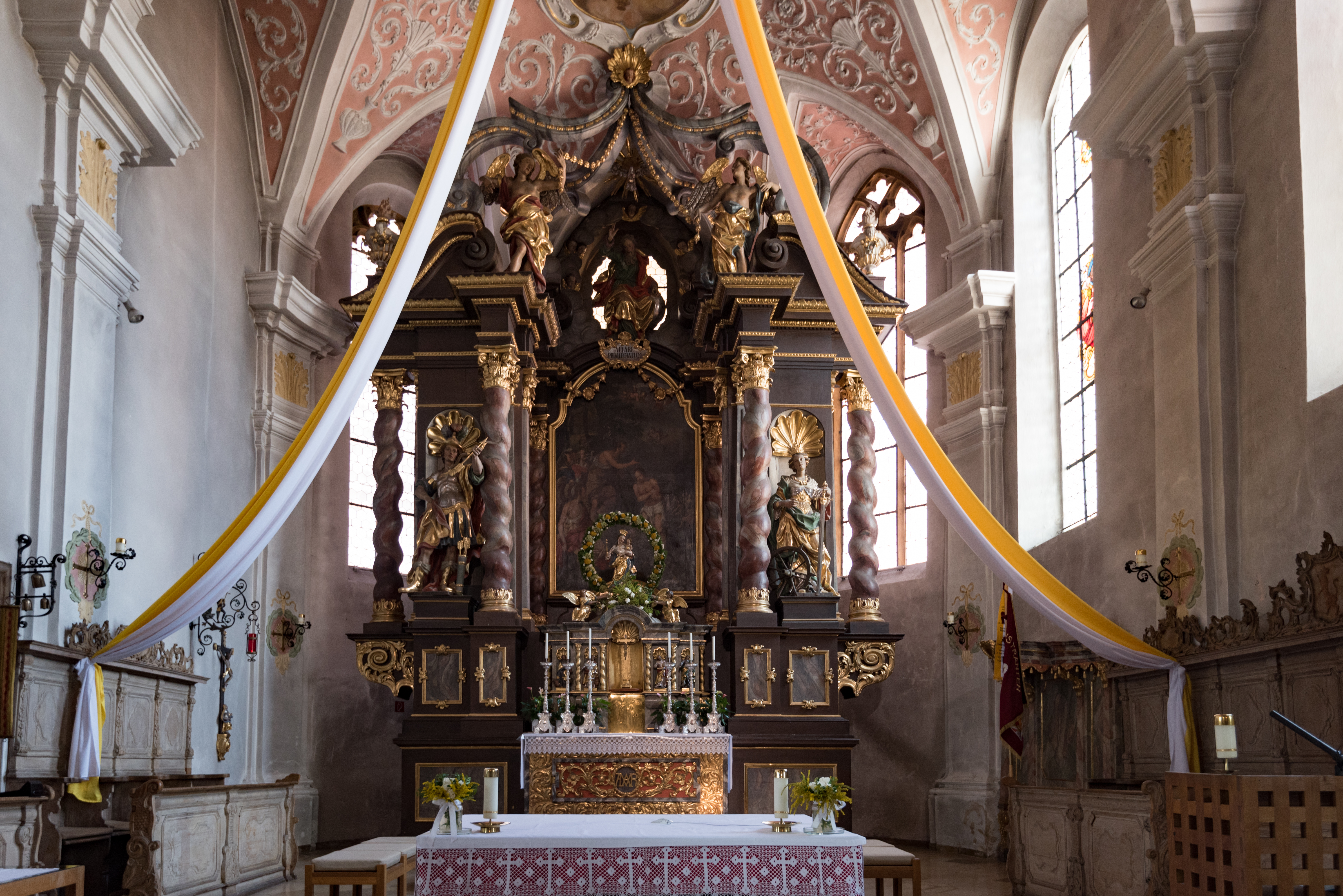 Velburg, Burgstraße 7, St. Johann Baptist